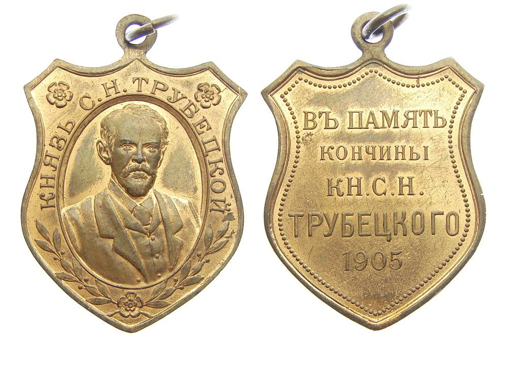 Медальон в память о смерти князя Сергея Николаевича Трубецкого в 1905 году